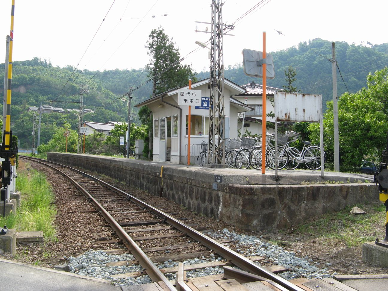 長野電鉄屋代線 大室駅 駅外からホームを望む